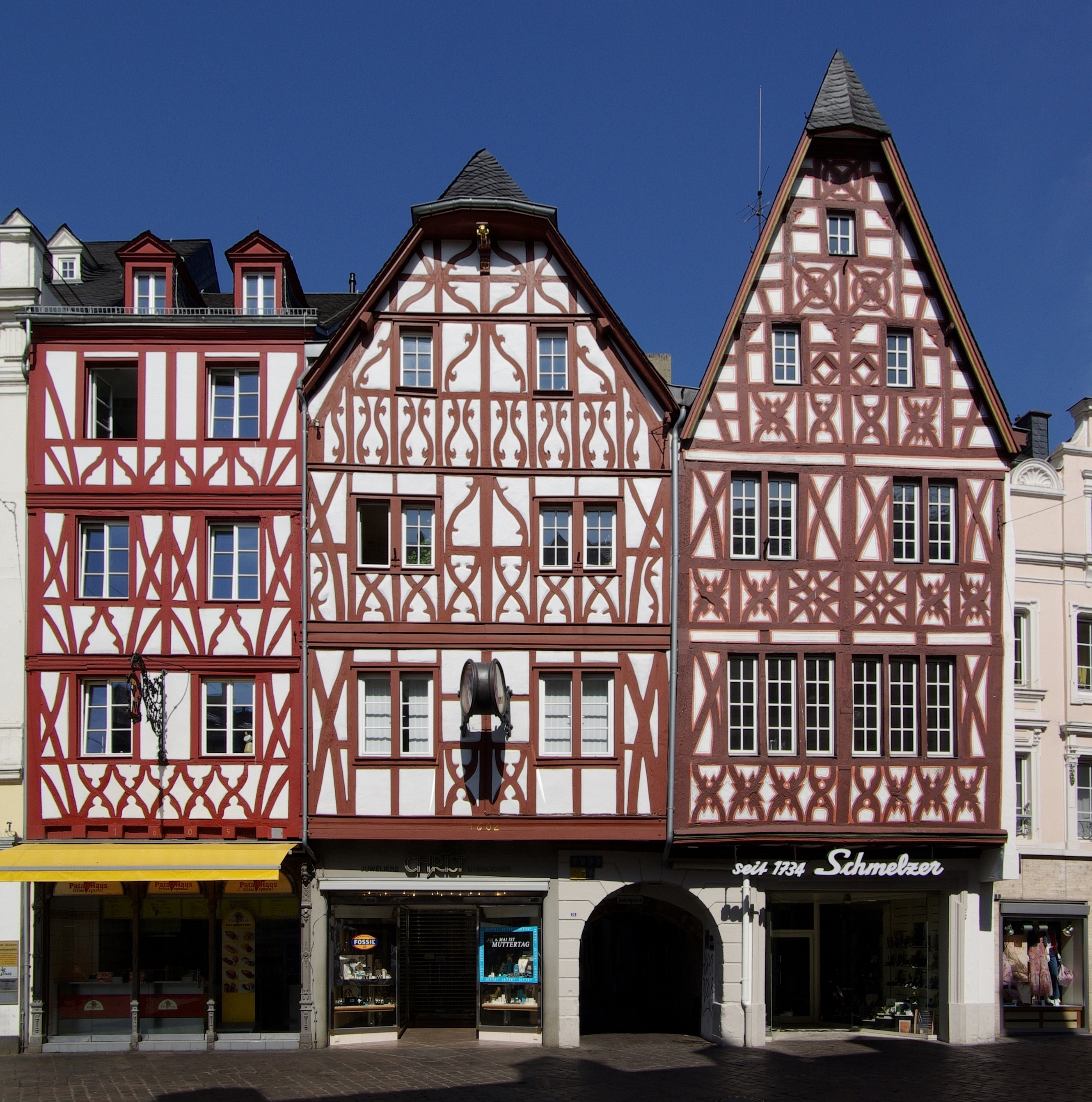 Trier, Hauptmarkt 22, Hauptmarkt 23, Simeonstraße 37: Fachwerkhäuser, teilweise massiv, um 1600, Nr. 23 bezeichnet 1602, Nr. 22 mit Ladeneinbau von 1895; vierbogige „Kleine Judenpforte“, um 1219; Ausstattung; unter den Vorderhäusern Nr. 22 und 23 tonnengewölbte Keller, unter Nr. 37 kreuzgratgewölbter, wohl hochmittelalterlicher Keller